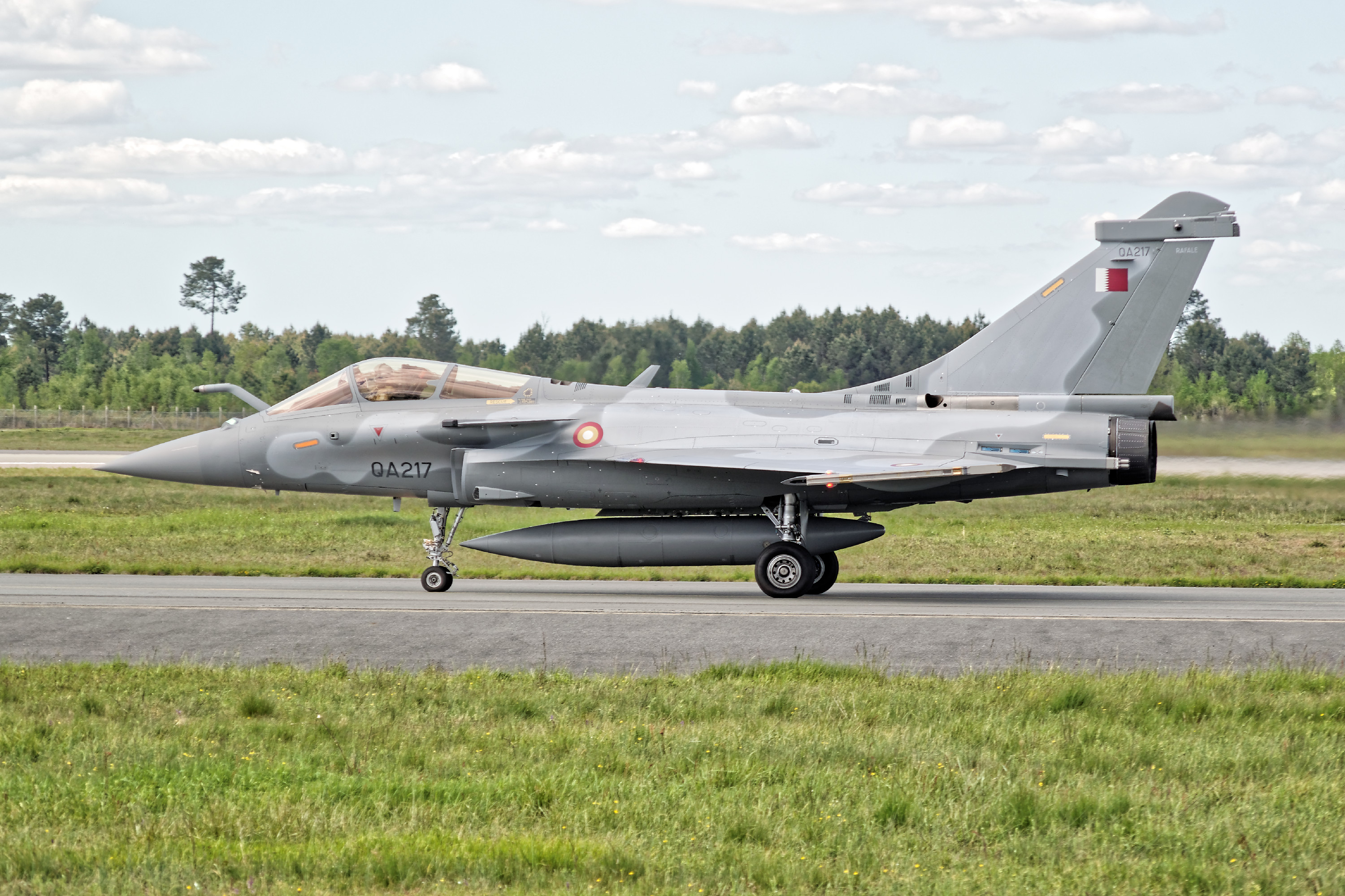 Aéroport de Bordeaux-Mérignac LFBD Airport (BOD)